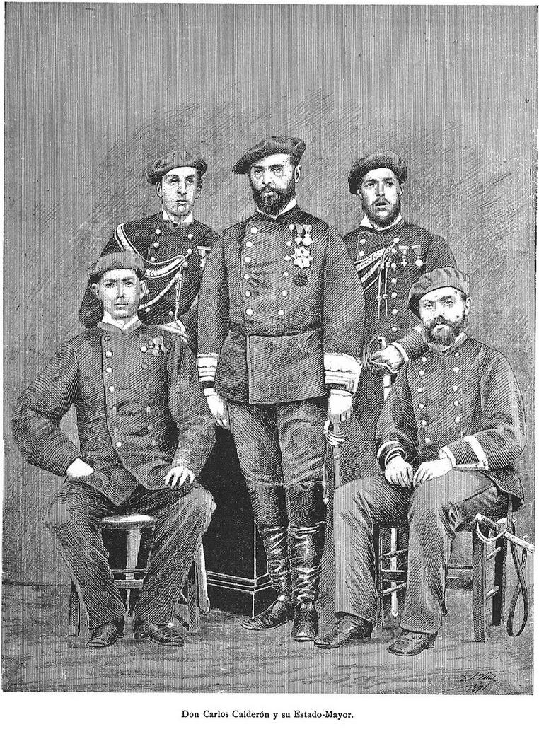 Don Carlos Calderón y su estado mayor